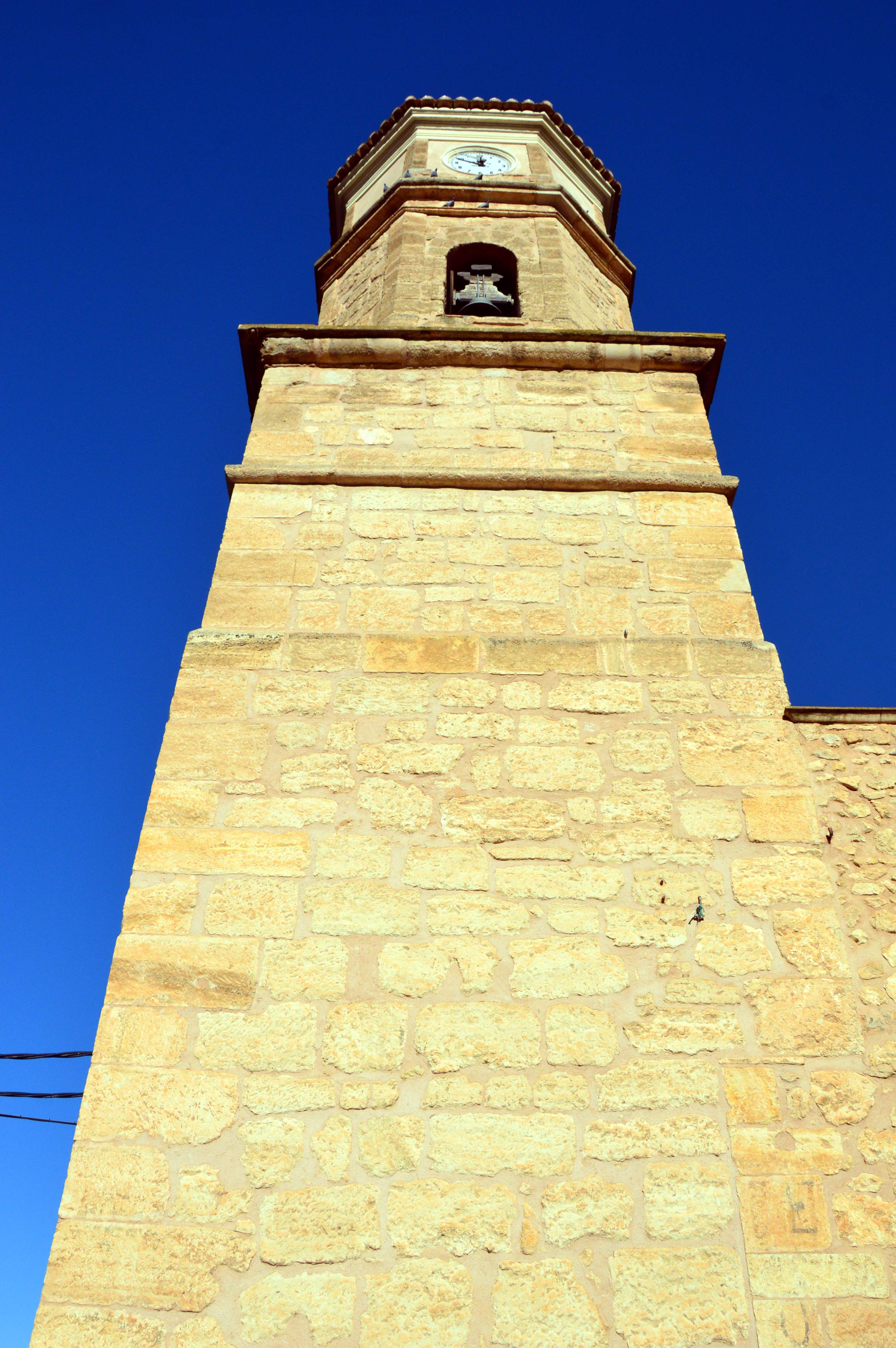 Vista pracial (meridional) del campanario de la parroquial de Casas Altas (Valencia), 2018.